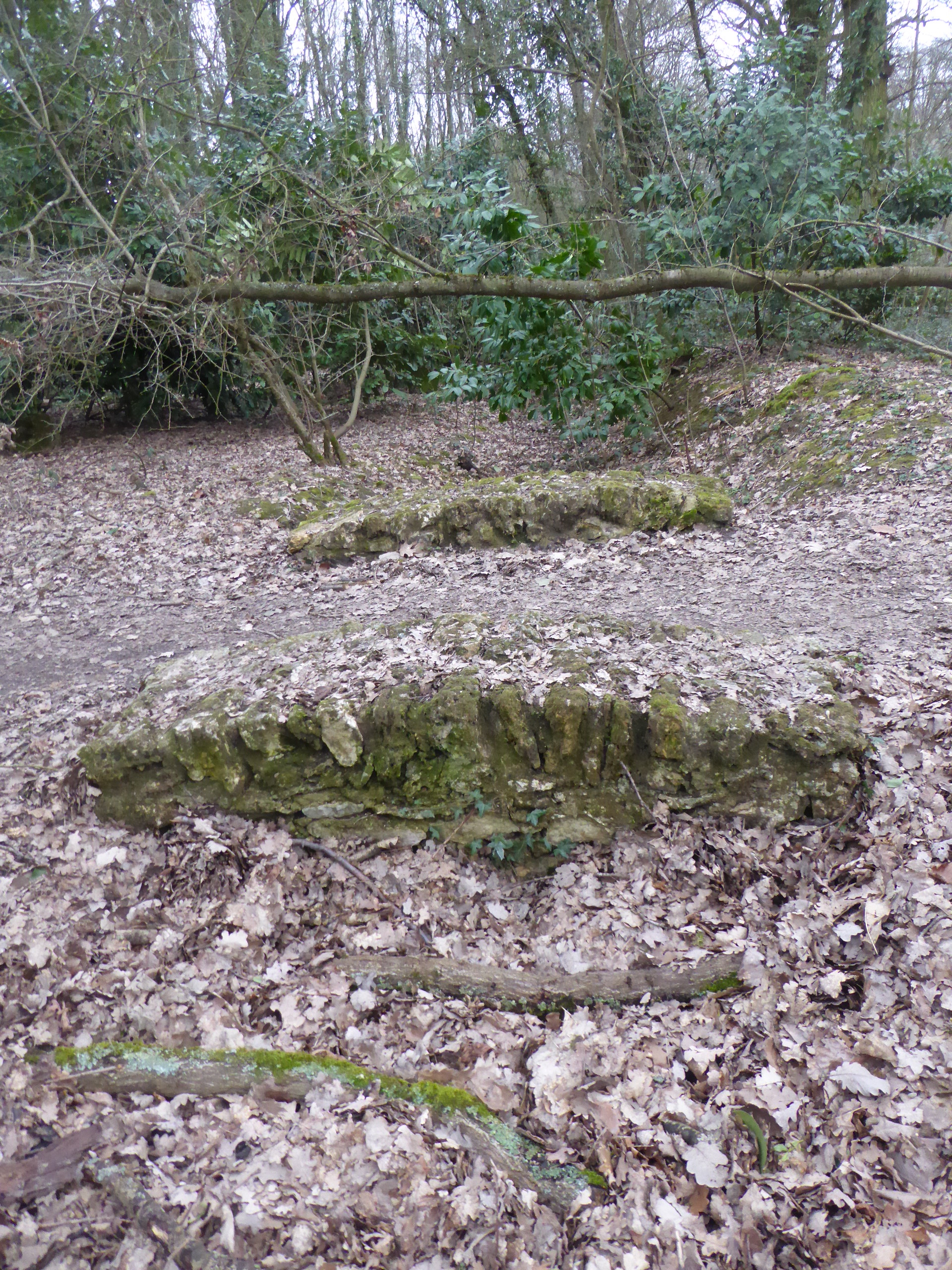 Aqueduc de Montigny à Guyancourt